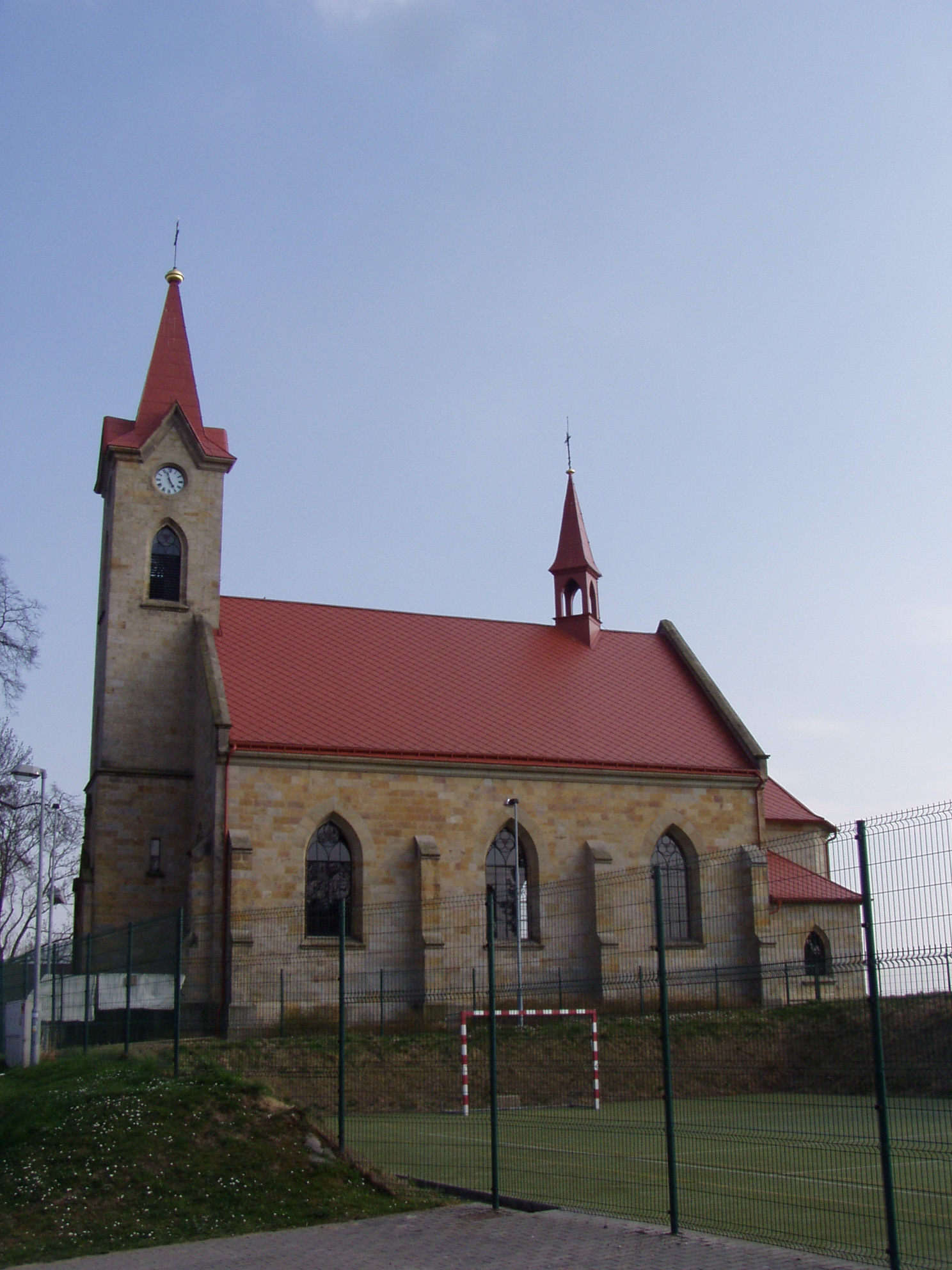 Kostel sv. Jana Nepomuckého (Huntířov)